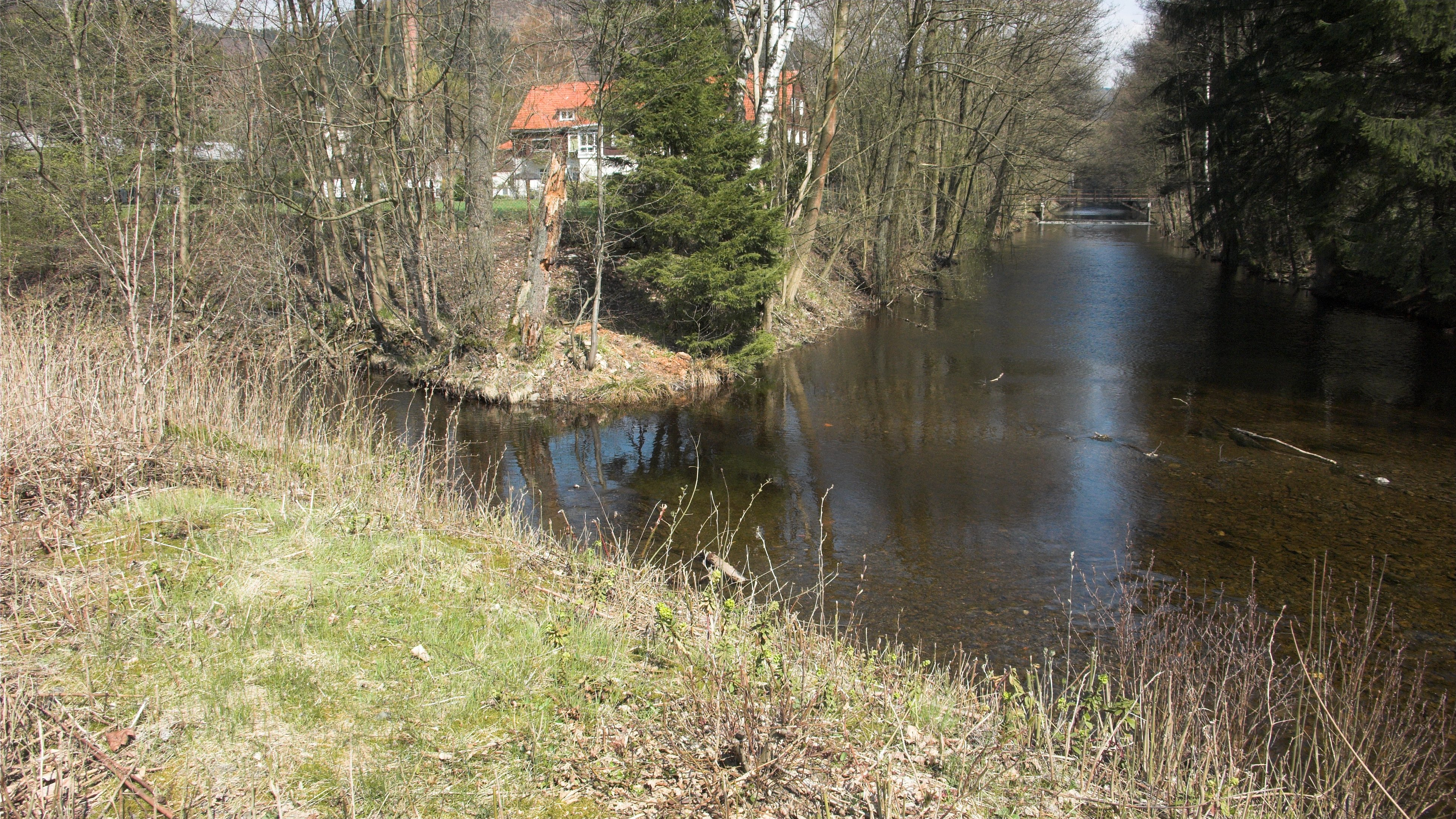 Einmündung der Sperrluter an der Ostseite von Bad Lauterberg